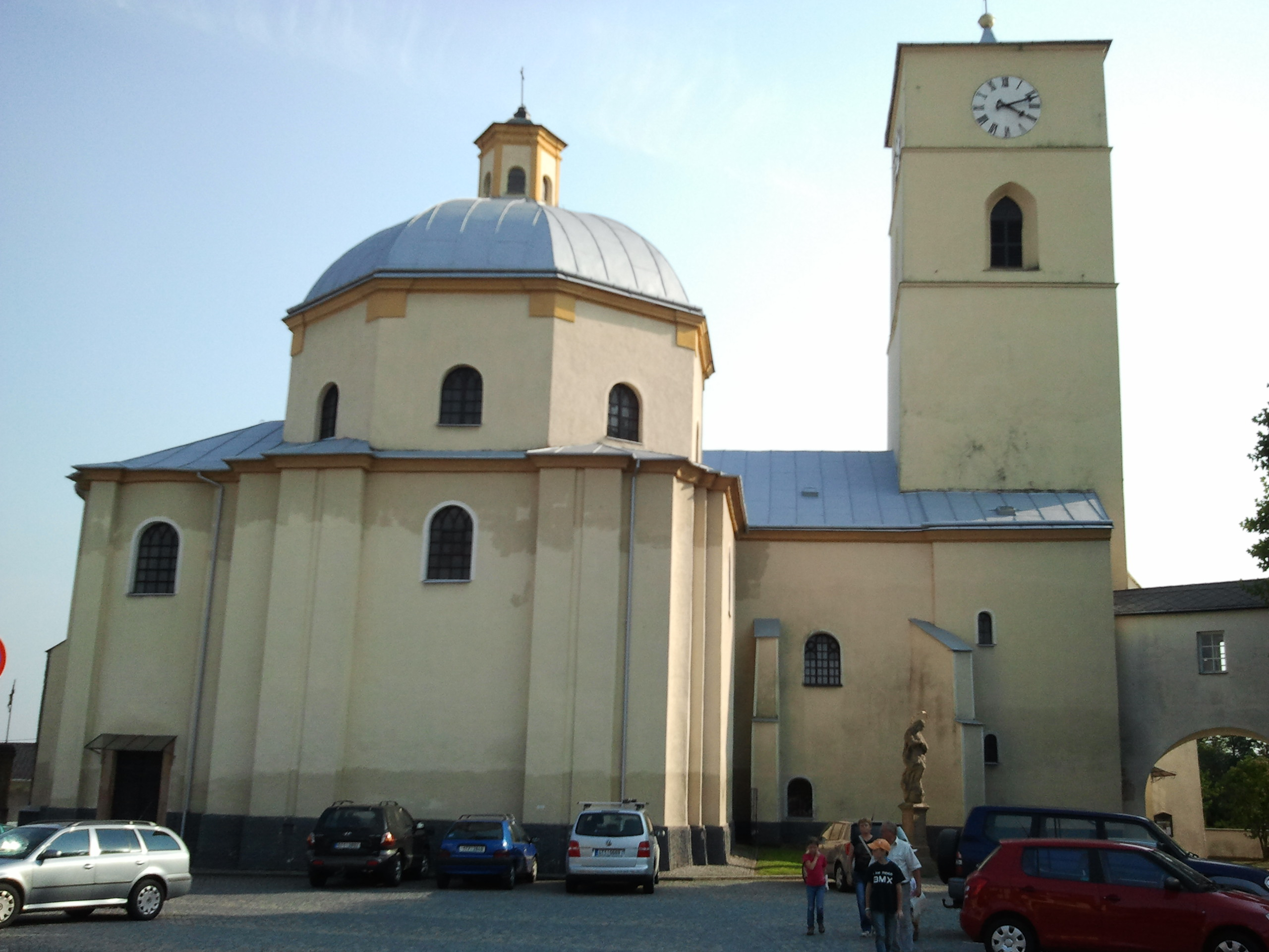 Kostel sv. Kateřiny (Klimkovice), Klimkovice